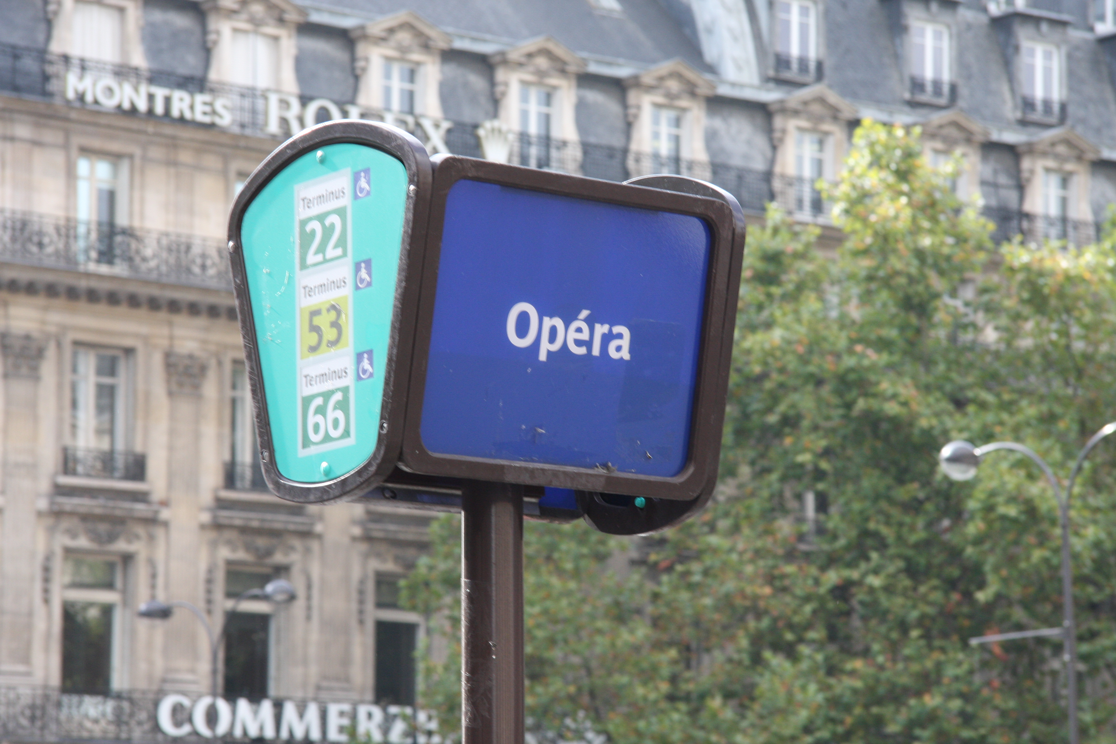 Bus stop, Place de l'Opéra, Paris.